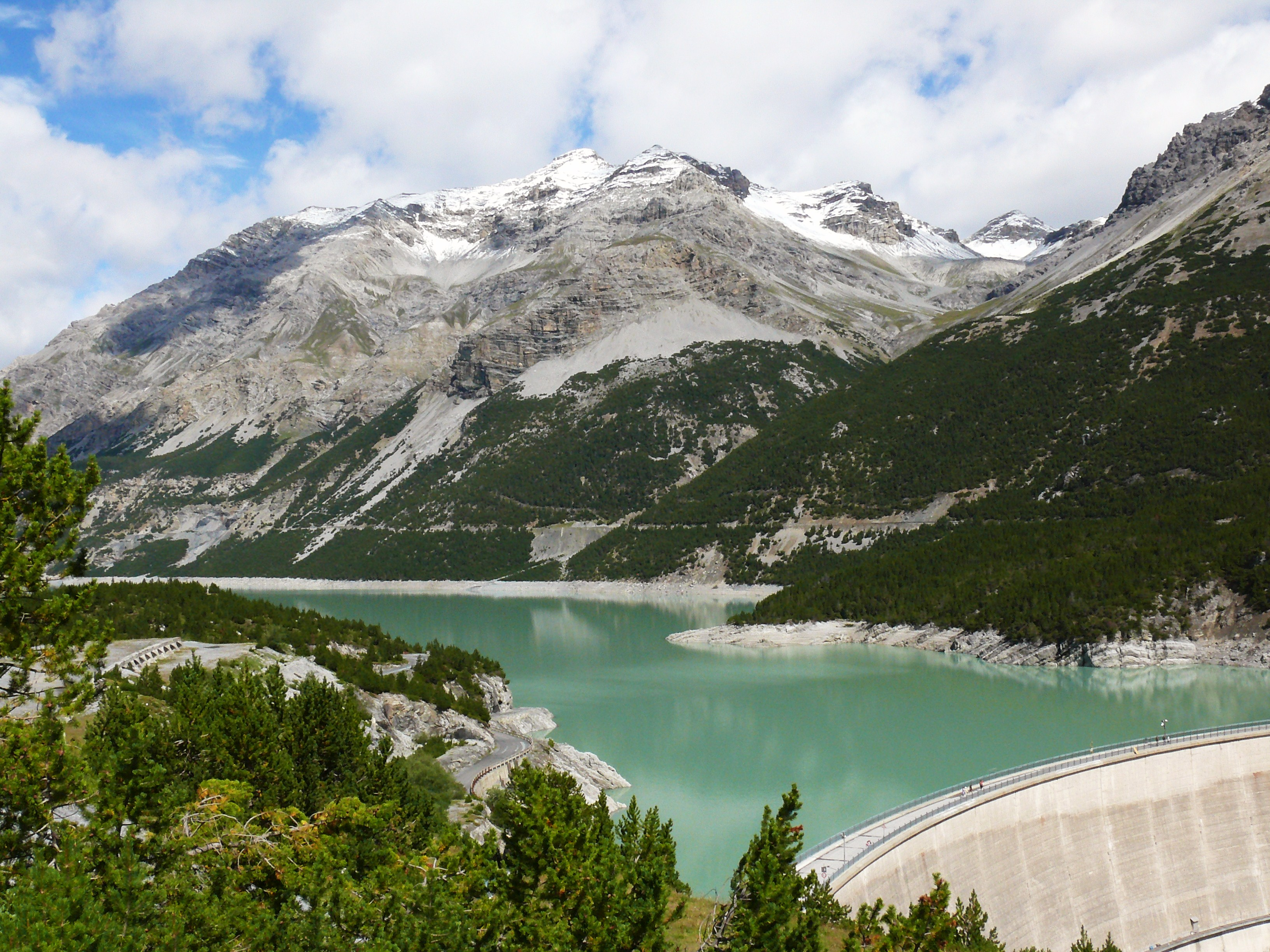 panorama dei laghi di Cancano